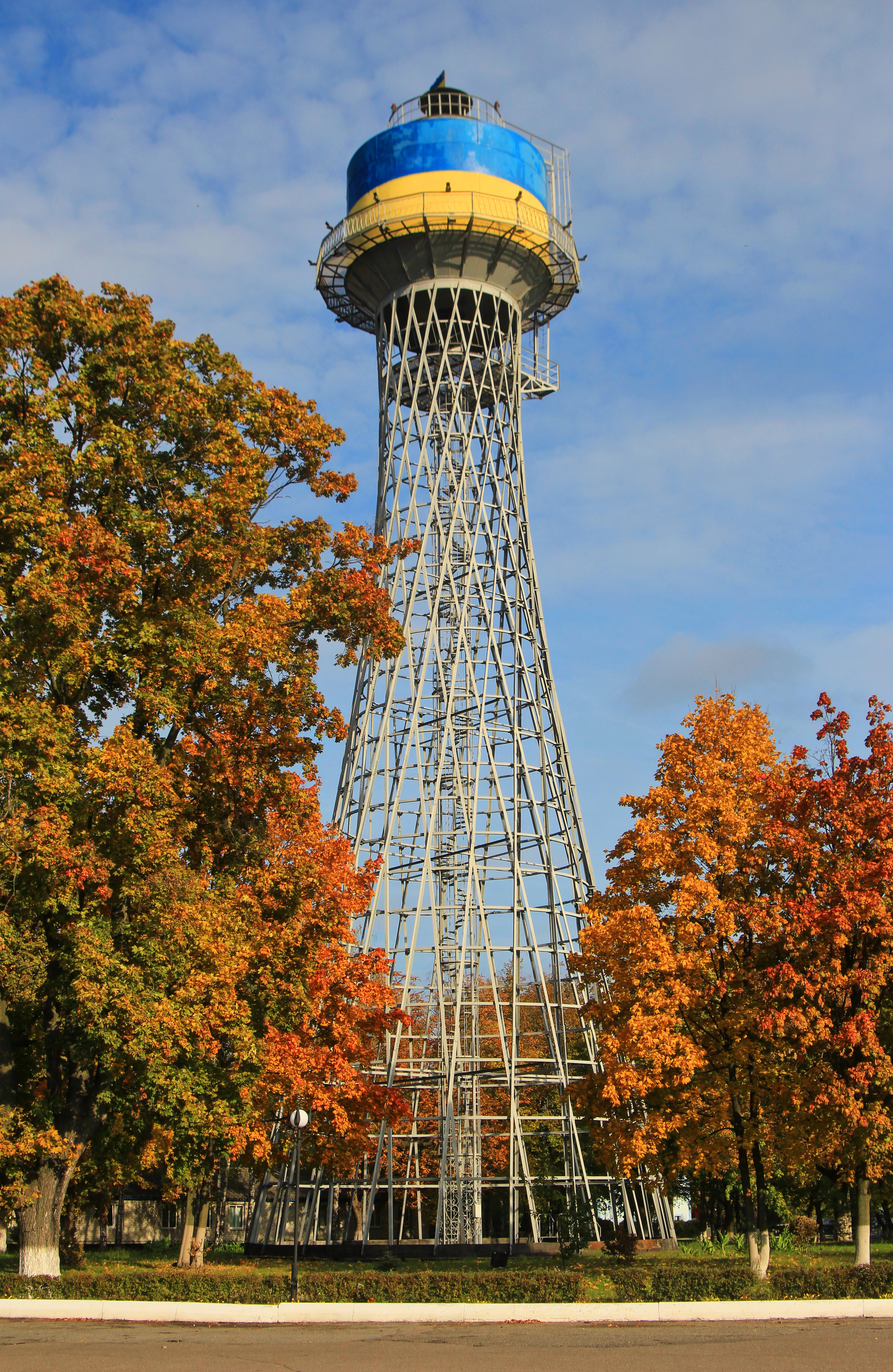 Осінь 2017